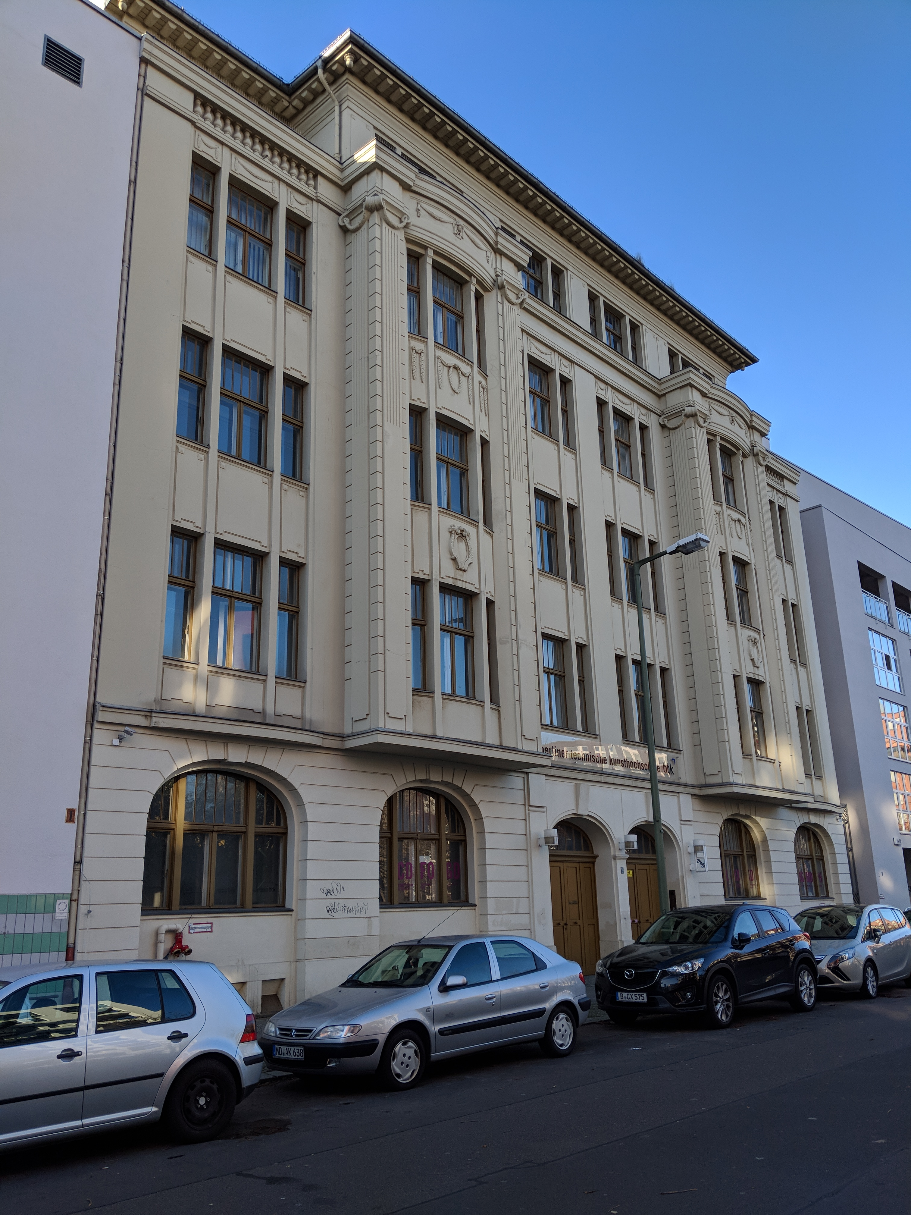 Berliner Technische Kunsthochschule